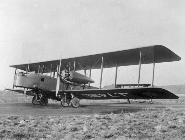 Vickers Virginia